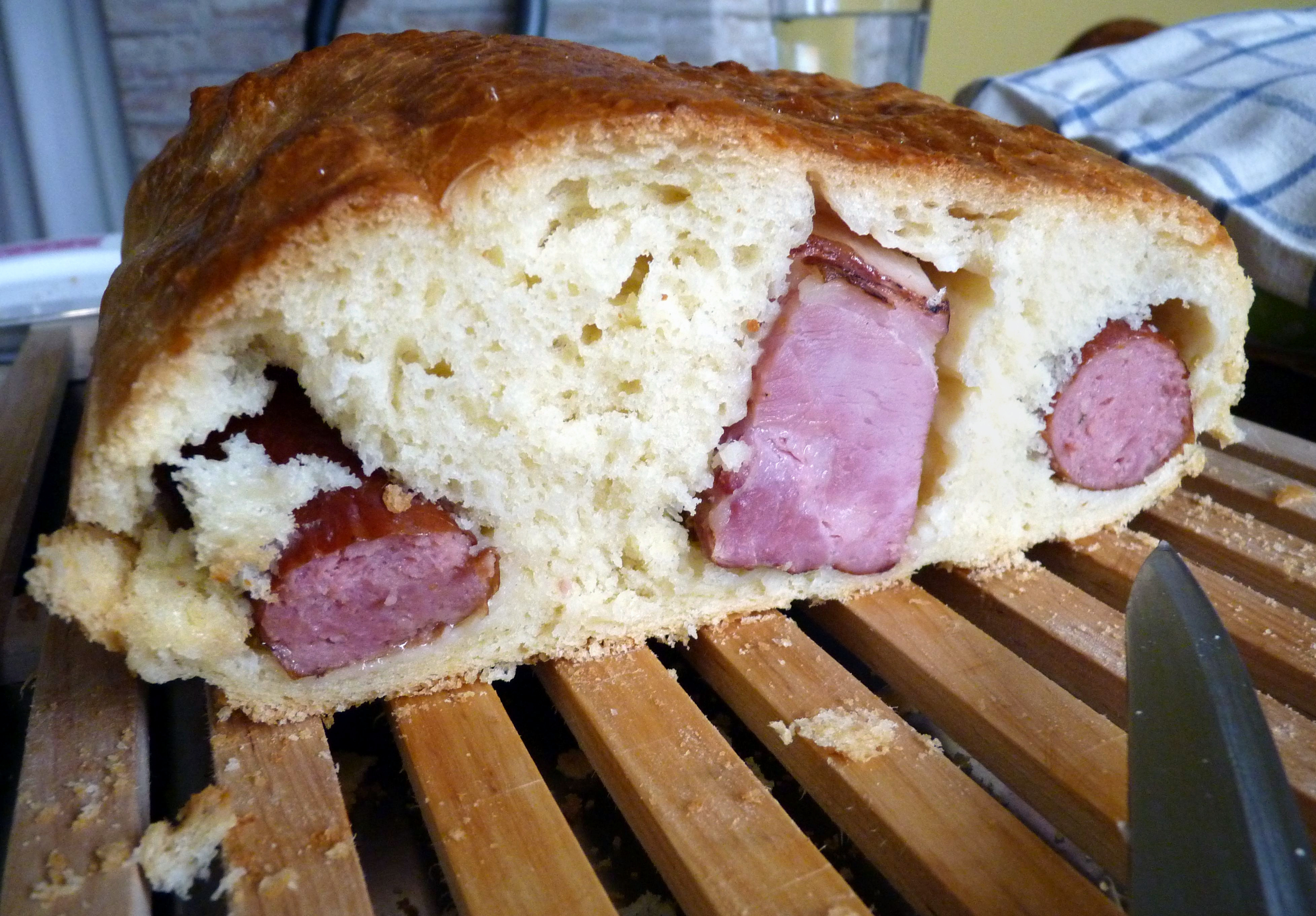 Pecínek (šoldra) s klobásou a bůčkem